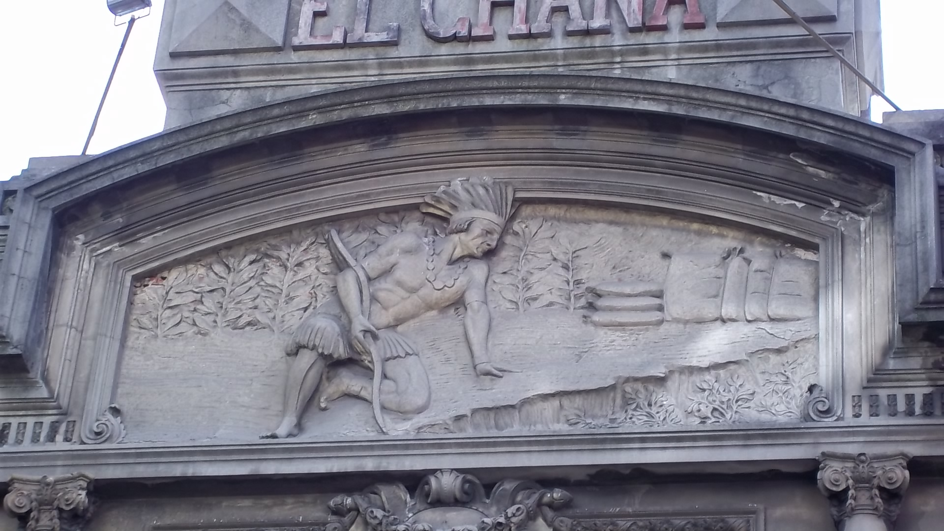 Detalle del indio chaná que luce en el frente del edificio El Chaná.